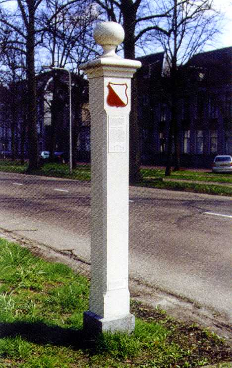 eigen opname